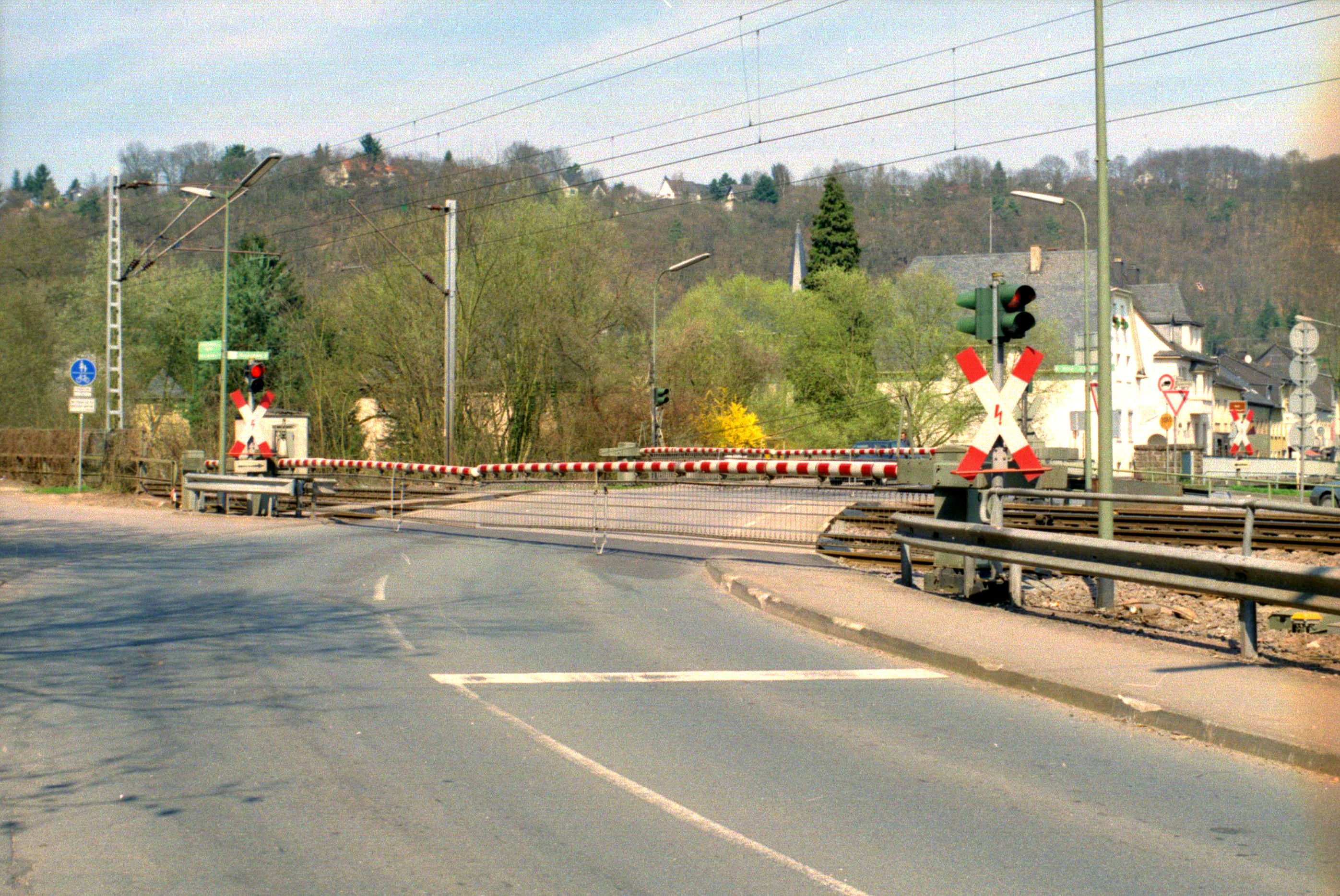 Beschrankter Bahnübergang mit vier Schrankenbäumen